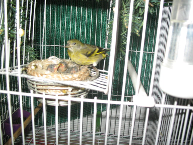 Hembra en el nido con sus crías Description: Hooded siskin female with its chicks (Carduelis magellanica) Creator: Eduardo de Matteo. Date: 14 de diciembre de 2007 (14-12-2007) Place: Buenos Aires (Argentina)